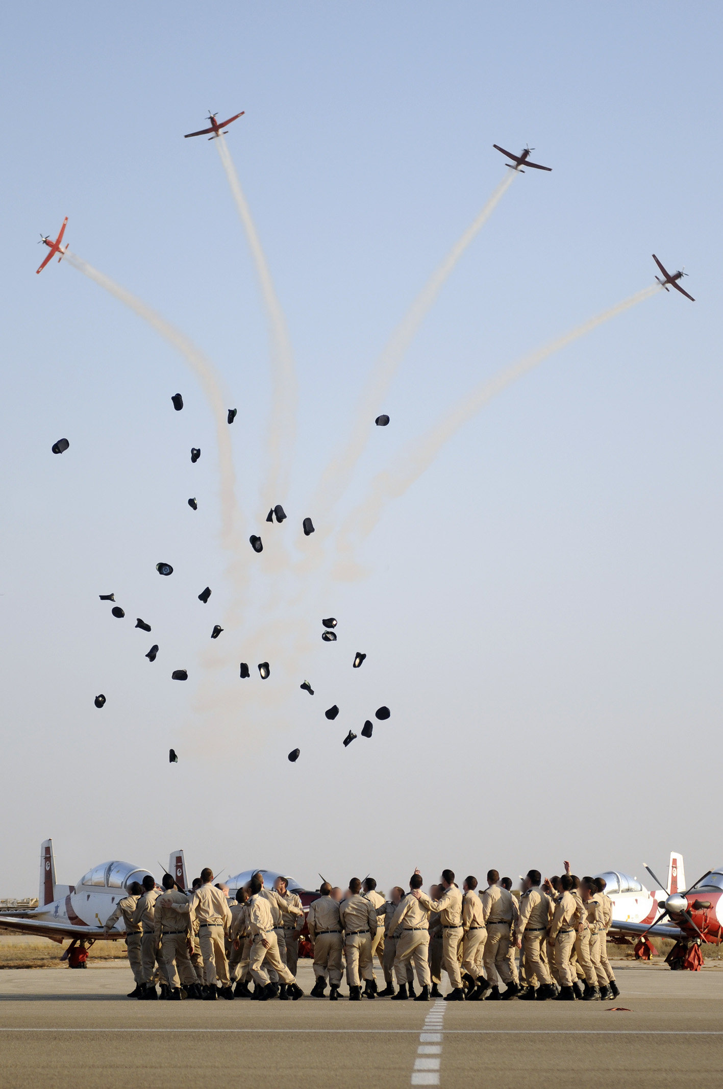 June 28th, 2011 An Air Force ceremony took place today at the Hatzerim base in which Flight School graduates, soon to be official pilots and flight navigators, were given their officer ranks. This follows three years of officer's training, pilot's training and an academic Bachlor's degree from Ben Gurion University. The ceremony was attended by the commander of the Hatzerim base, the commander of the Israeli Air Force Flight School, the friends and families of the graduates, and other Air Force personnel. היום התקיים טקס הענקת דרגות קצונה לבוגרי קורס טיס, בבסיס חיל האוויר בחצרים. לבוגרים הטריים הוענקו דרגות סגן, סרן ורב-סרן. זאת, בסופן של שלוש שנות הכשרה לתפקיד הקצין, הכשרת טייס ותואר אקדמאי מאוניברסיטת "בן-גוריון". הטקס נערך במעמד מפקד בסיס חצרים, תת-אלוף זיו ומפקד בית הספר לטיסה אלוף-משנה תומר, ובנוכחות משפחות, חברים ואנשי חיל האוויר